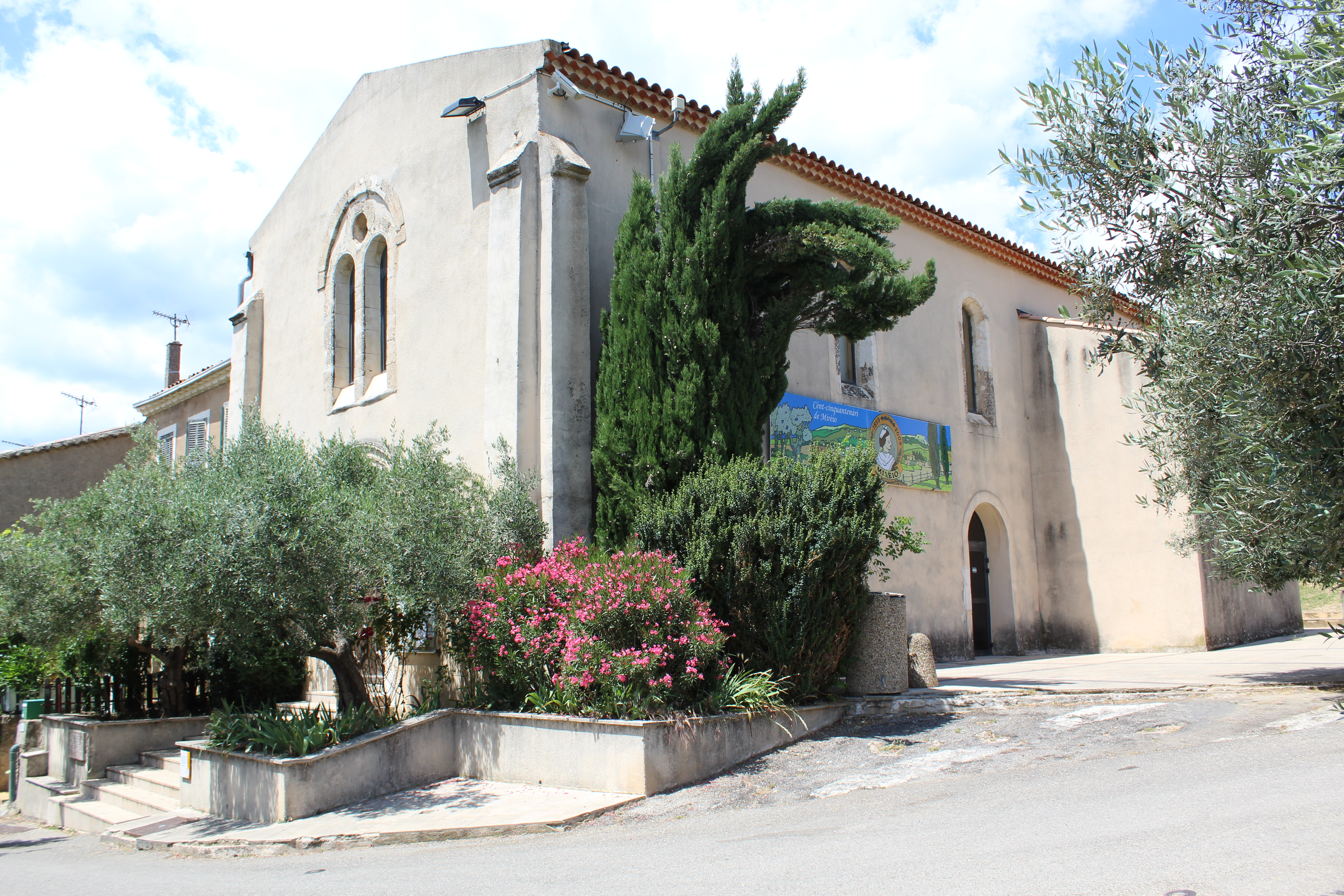 L'église